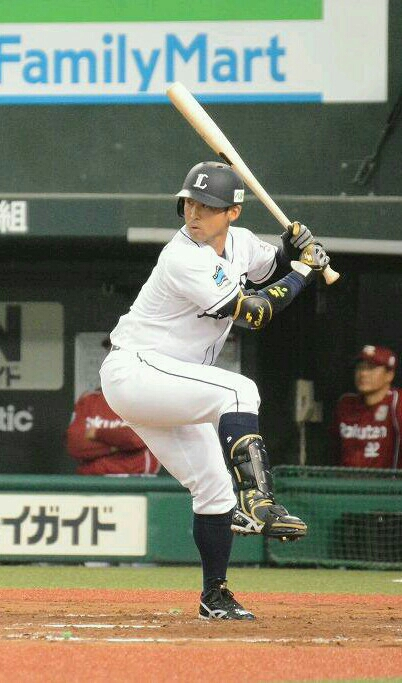 baseball-seibu